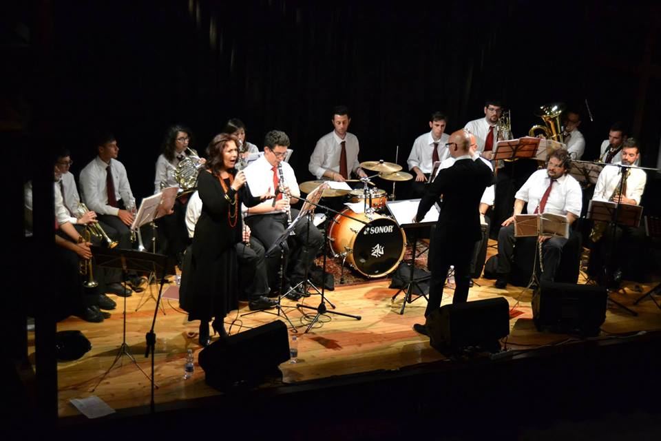 Concerto Banda di Avola e Rita Botto a Catania